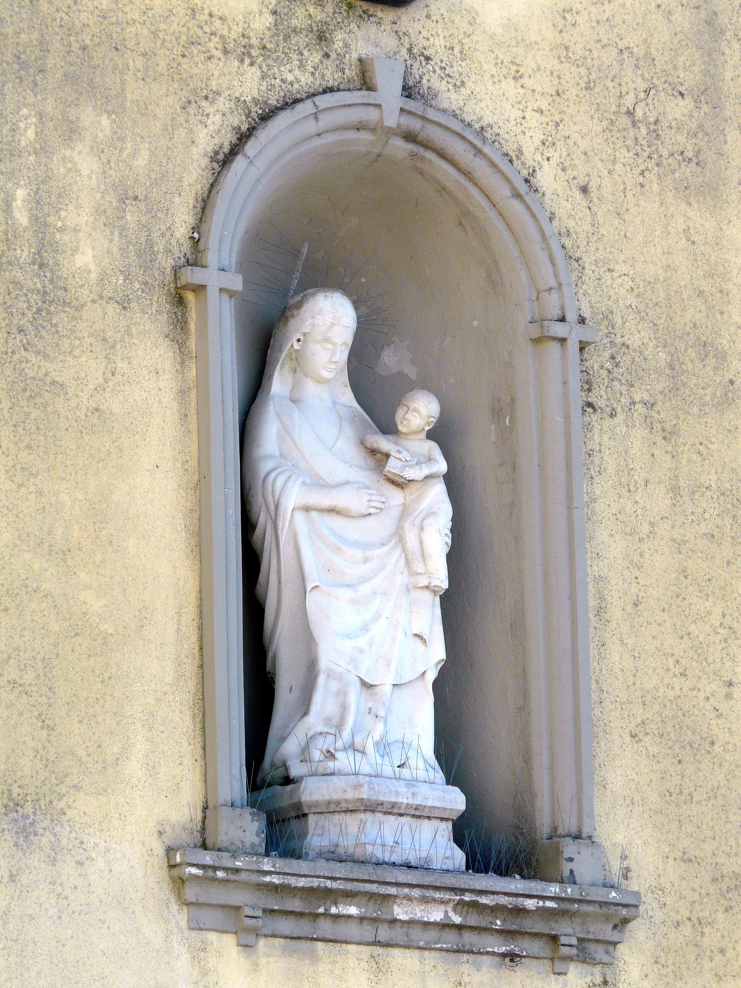 Particolare della statua della Madonna con Bambino presso la facciata della chiesa dei Santi Jacopo e Cristofano, Podenzana, Toscana, Italia